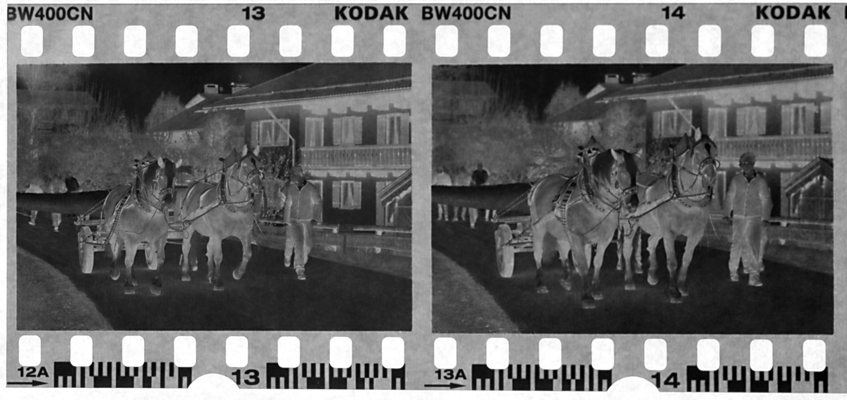 Beispiel eines Schwarz-Weiß-Negativ-Filmstreifens für das C-41-Verfahren, Kleinbild, Kodak BW 400 CN